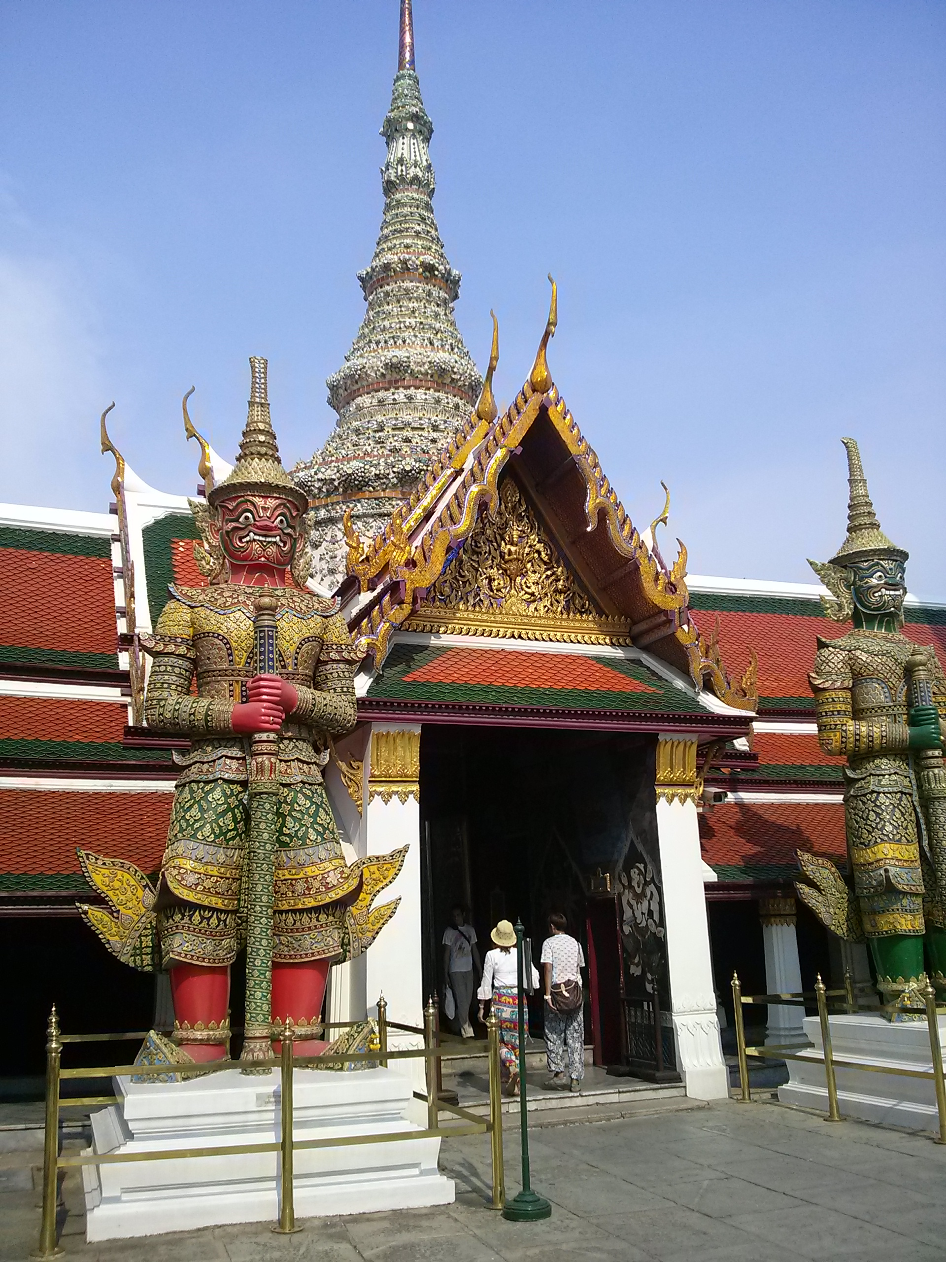 Phra Borom Maha Ratchawang, Phra Nakhon, Bangkok, Thailand